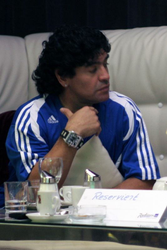 Diego Armando Maradona, mirando por televisión el partido entre Alemania y Suecia por los octavos de final de la Copa Mundial de Fútbol de 2006.